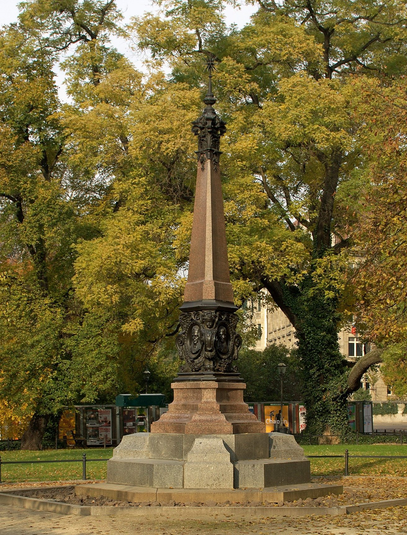 Denkmal für Karl Gottlieb Plato und Johann Christian Dolz am Dittrichring in Leipzig (Plato-Dolz-Denkmal)